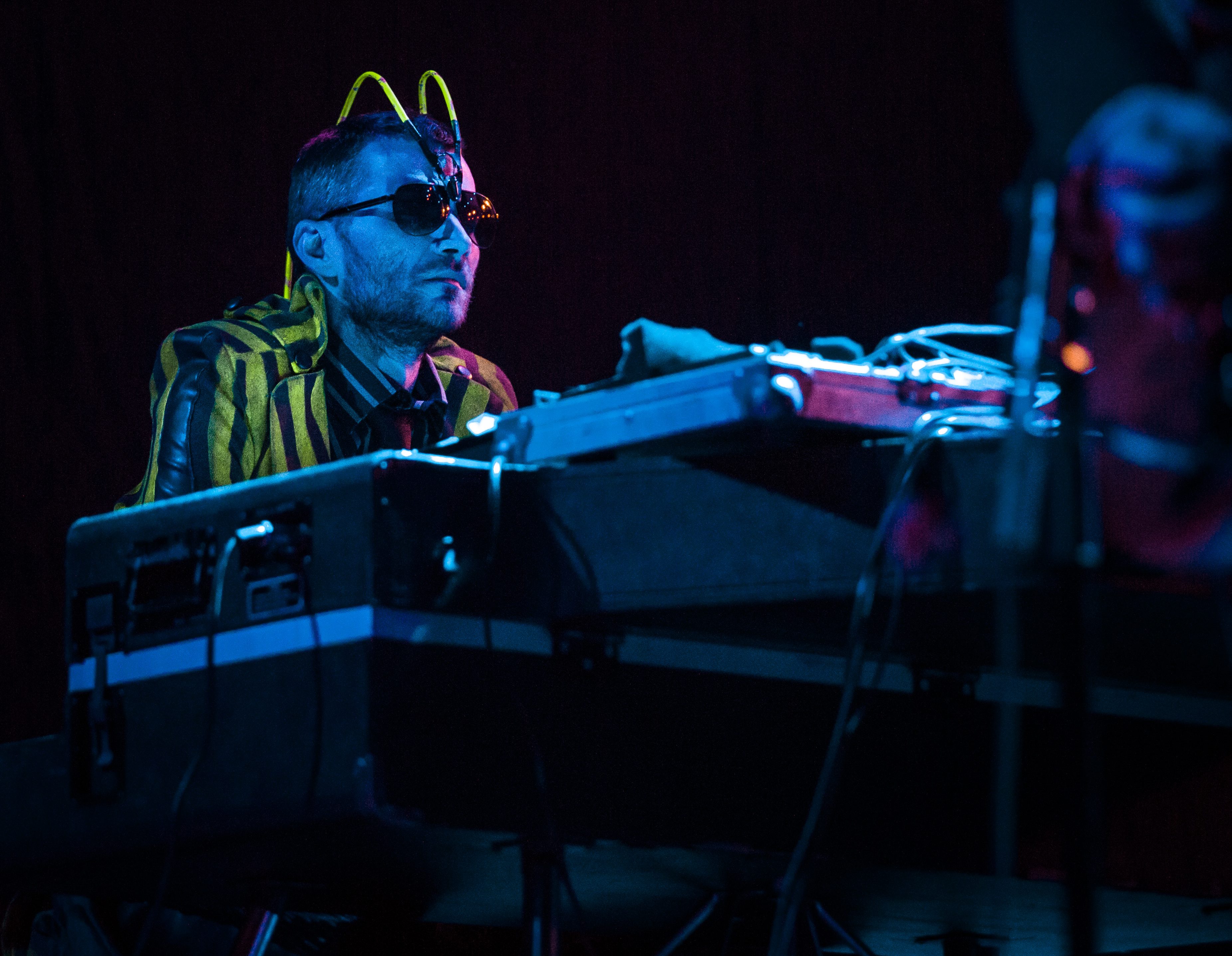 Jarosław Jóźwik "Poń Kolny", klawiszowiec zespołu Łąki Łan podczas Rocket Festiwal 2013 w Warszawie.